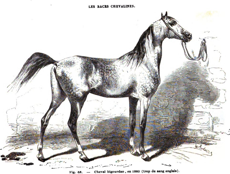 Cheval bigourdin en 1860